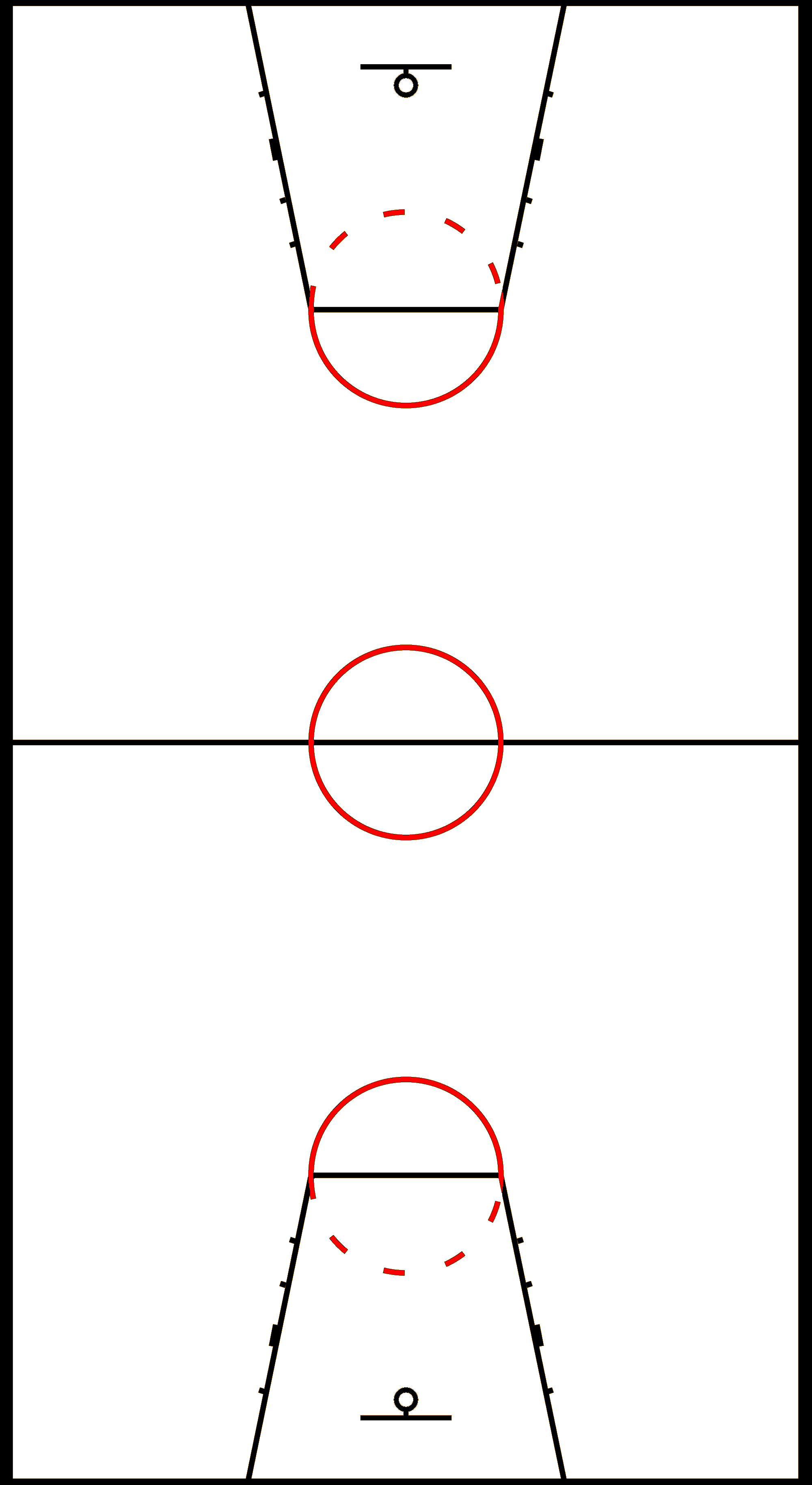 Boisko FIBA do roku 2010 - na czerwono zaznaczone koła występujące na boisku